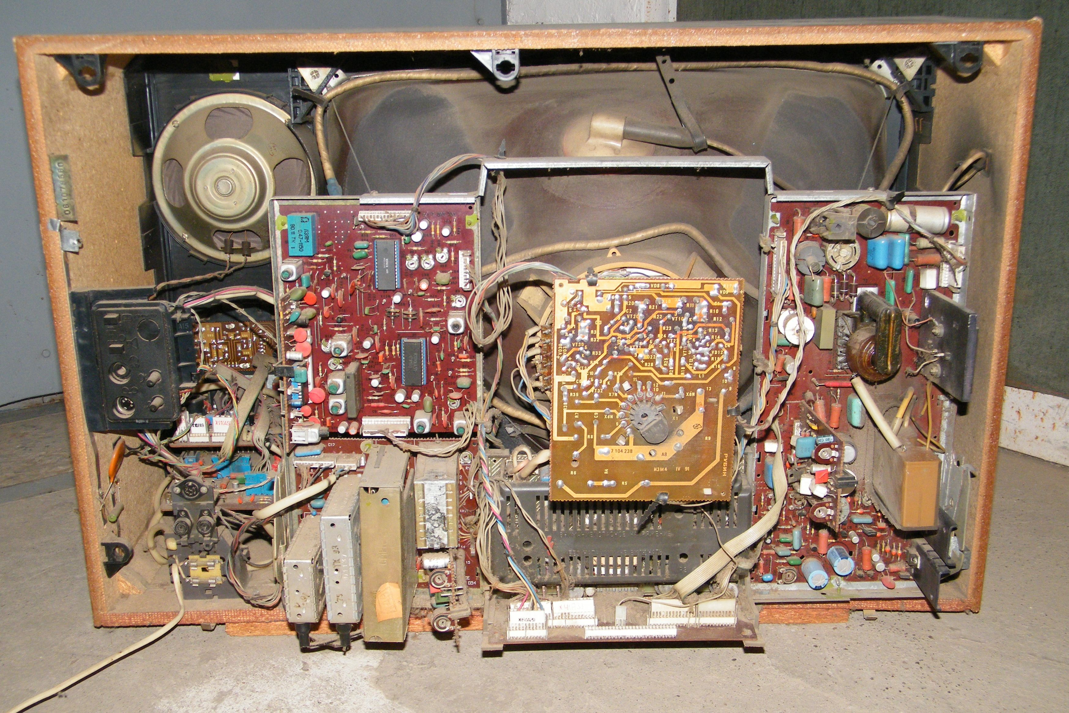 Цветной телевизор Рубин 61ТЦ403Д внутри